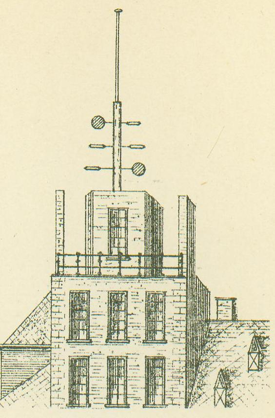 Schets van de Lipkens telegraaf op het Haagse Buitenhof in ca 1831.